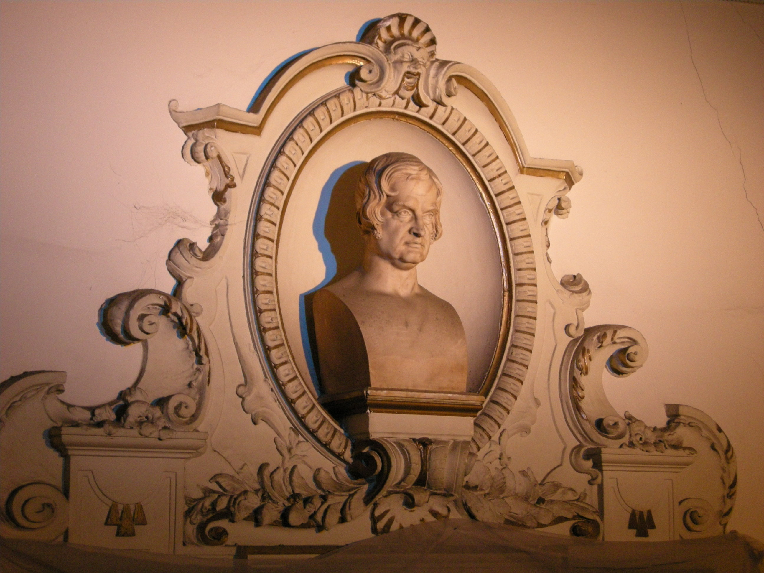 Teatro niccolini, interno, scale 03 busto